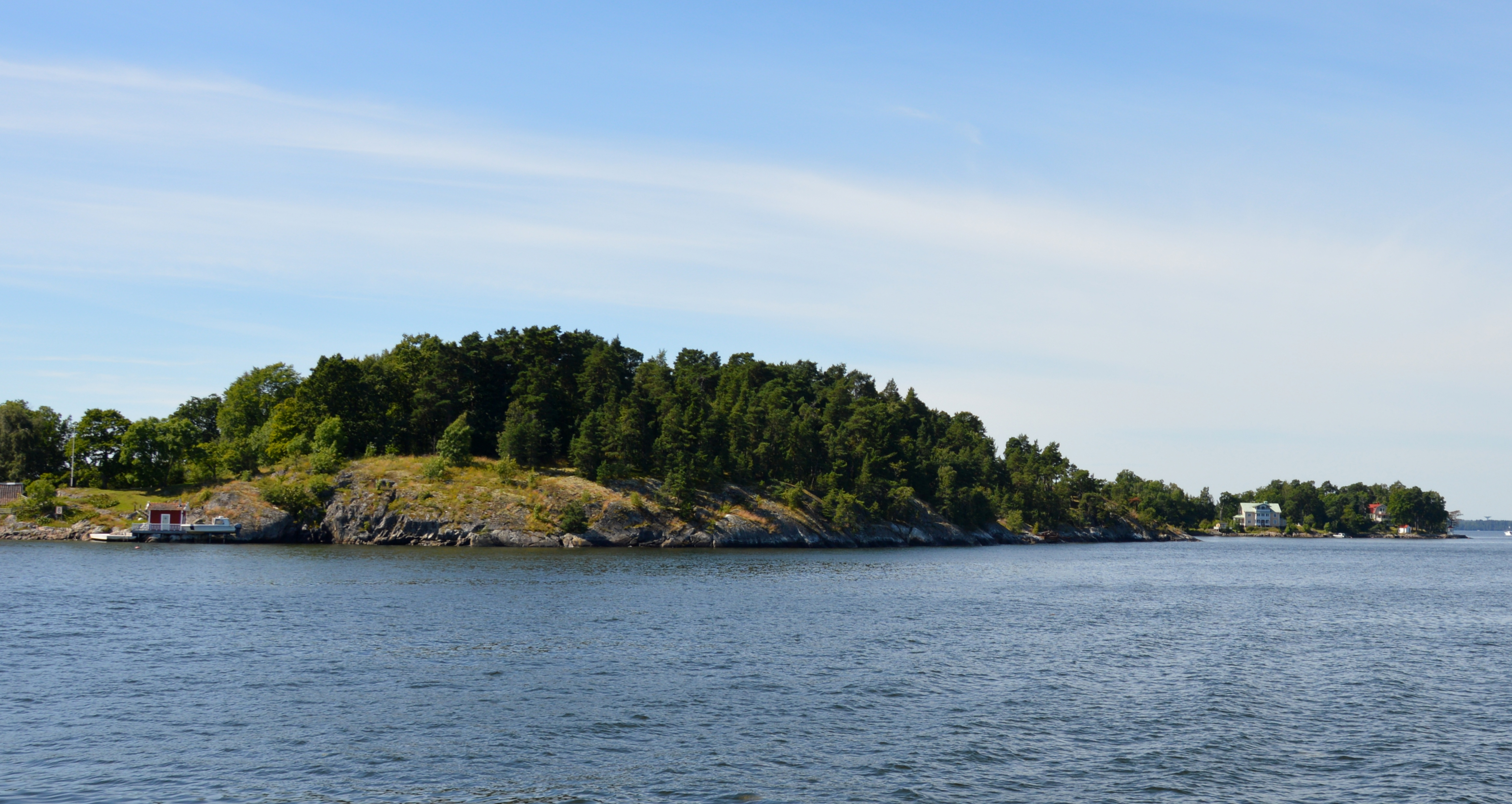 Granholmen Nordseite